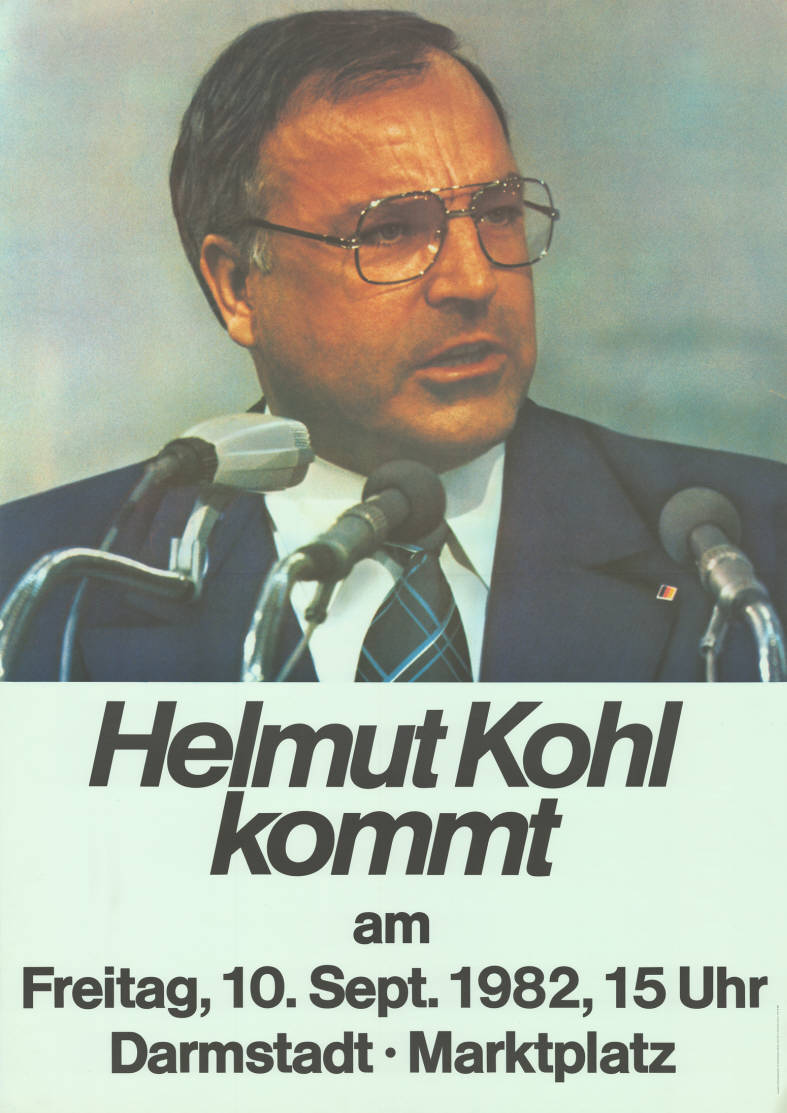 Helmut Kohl kommt ... Abbildung: Porträtfoto Plakatart: Kandidaten-/Personenplakat mit Porträt Auftraggeber: CDU-Bundesgeschäftsstelle, Abt. Öffentlichkeitsarbeit, Bonn Drucker_Druckart_Druckort: Willy F.P. Fehling GmbH, Hannover Objekt-Signatur: 10-007 : 584 Bestand: Landtagswahlplakate Hessen (10-007) GliederungBestand10-18: Landtagswahlplakate Hessen (10-007) » CDU Lizenz: KAS/ACDP 10-007 : 584 CC-BY-SA 3.0 DE